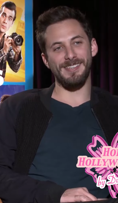 Sebastián Zurita y Paulina Dávila hablan de su química y escucha a Zurita hablar perfecto Inglés